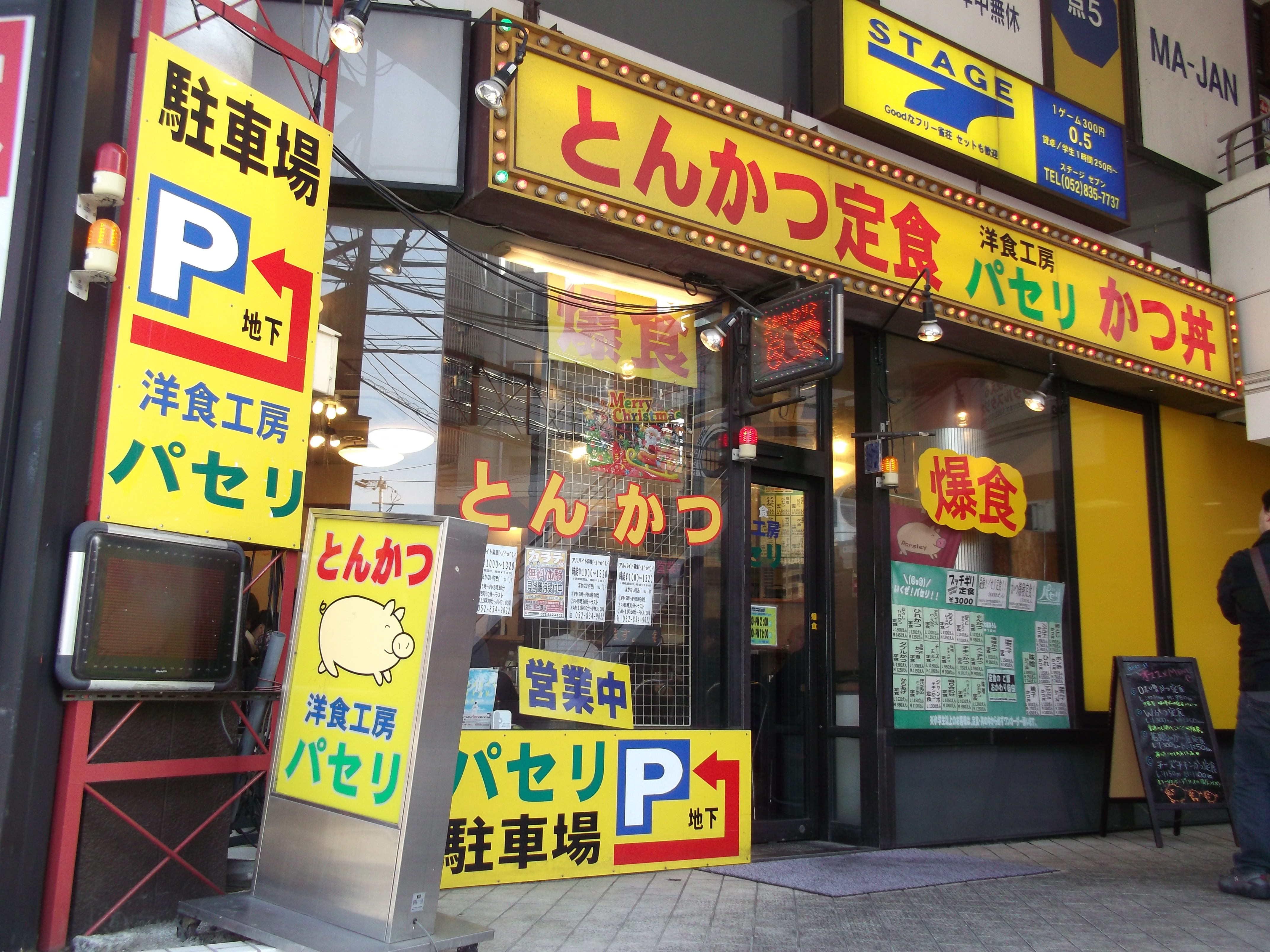 名古屋市天白区塩釜口に所在するとんかつ店「洋食工房パセリ」店舗外観